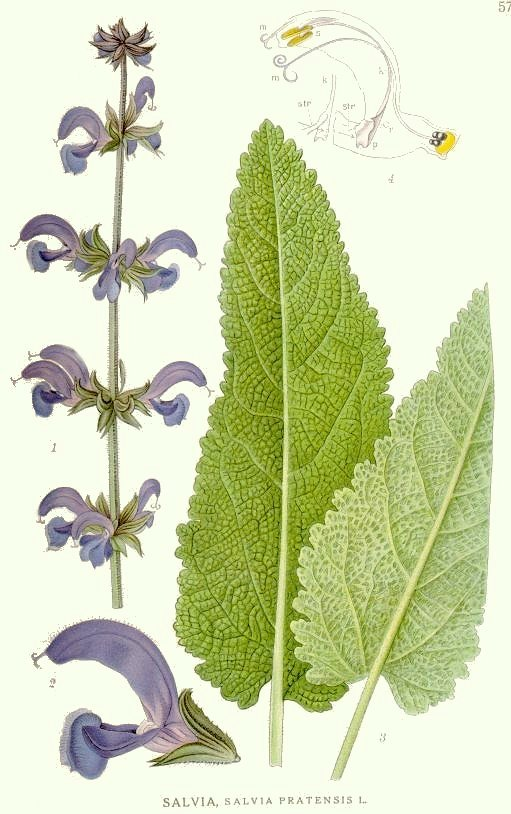 Original Description Salvia, Salvia pratensis L.